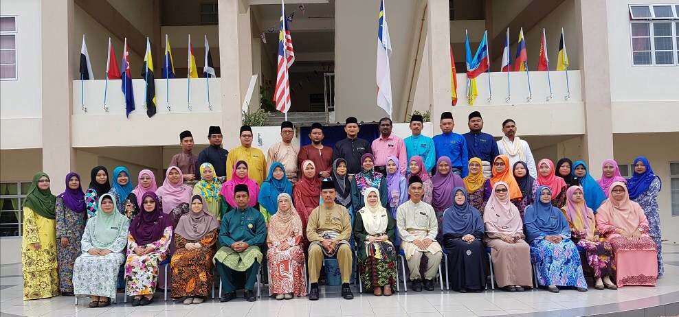 GURU-GURU SMKTSZ